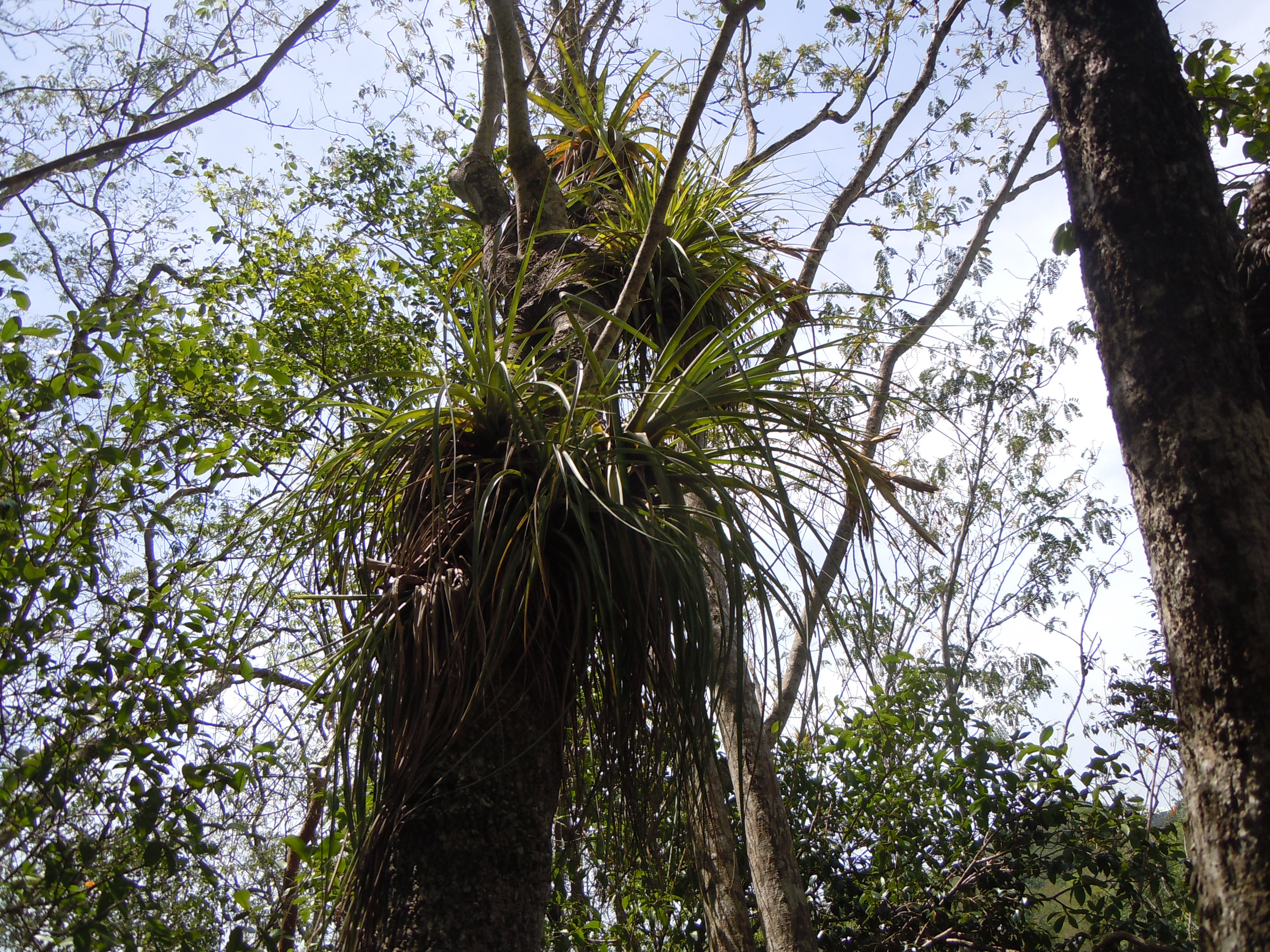 Tillandsia fasciculata - (Epiphyte) - Forêt de Malendure - Guadeloupe